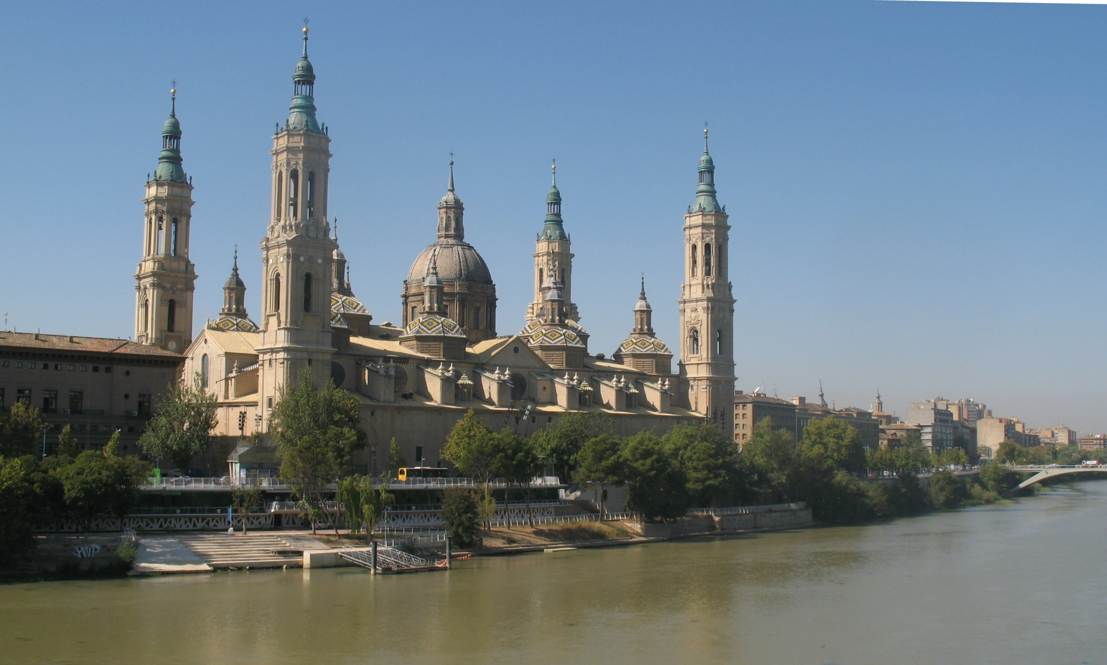 Символ Сарагосы